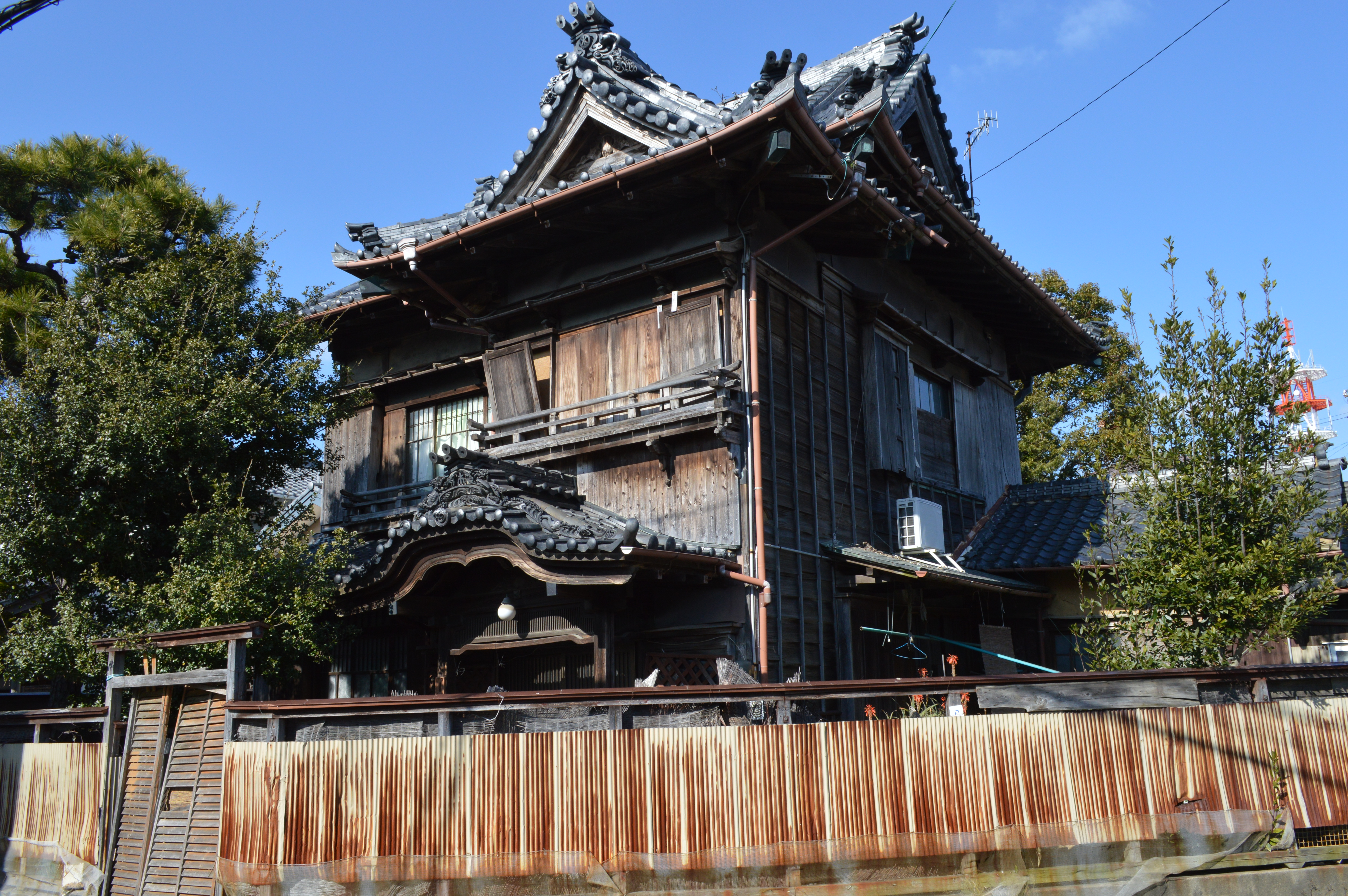 愛知県田原市。かつて置屋として使用されていた建物。